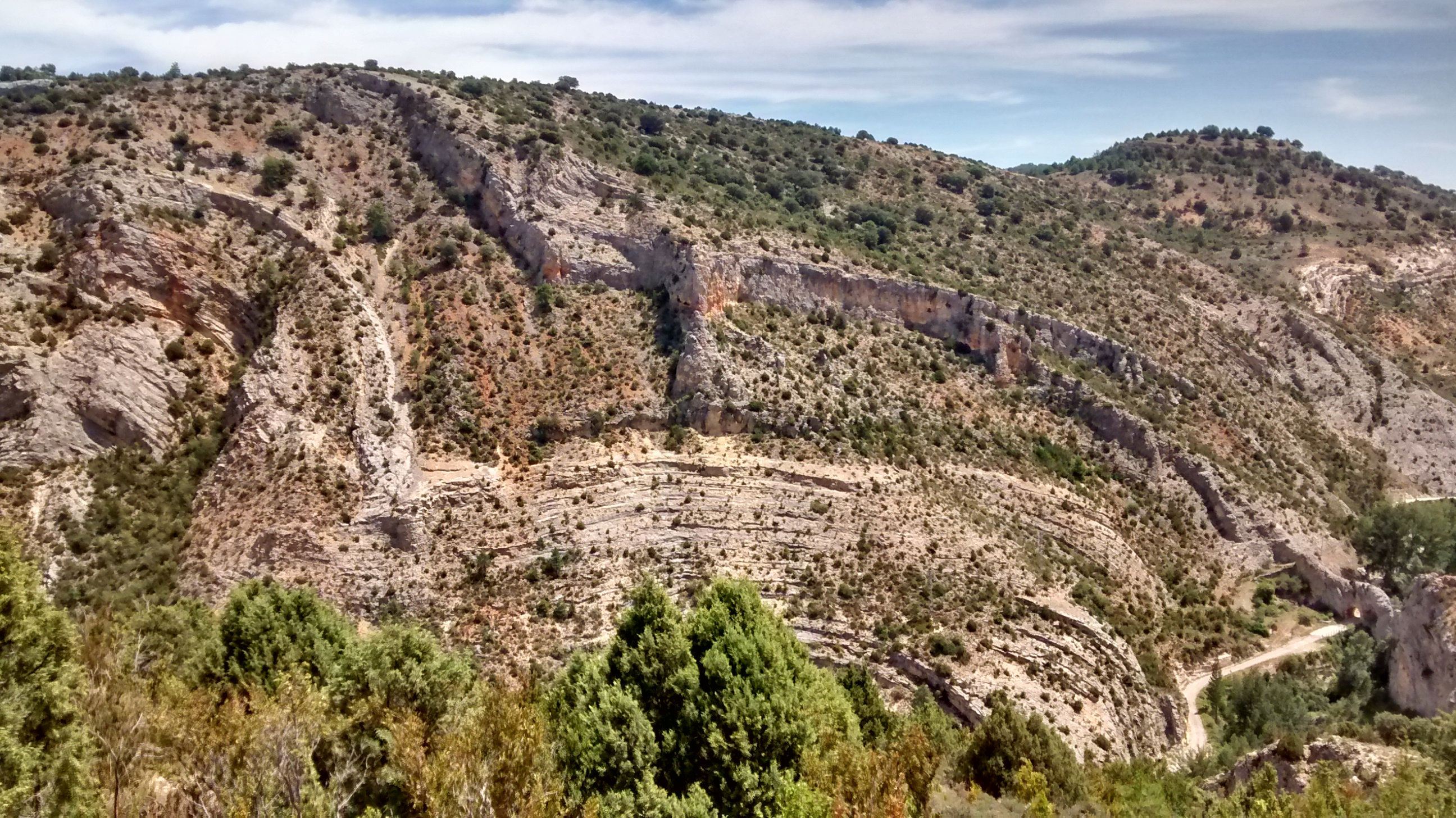 Muestra de un plegamiento geológico en Huertapelayo.